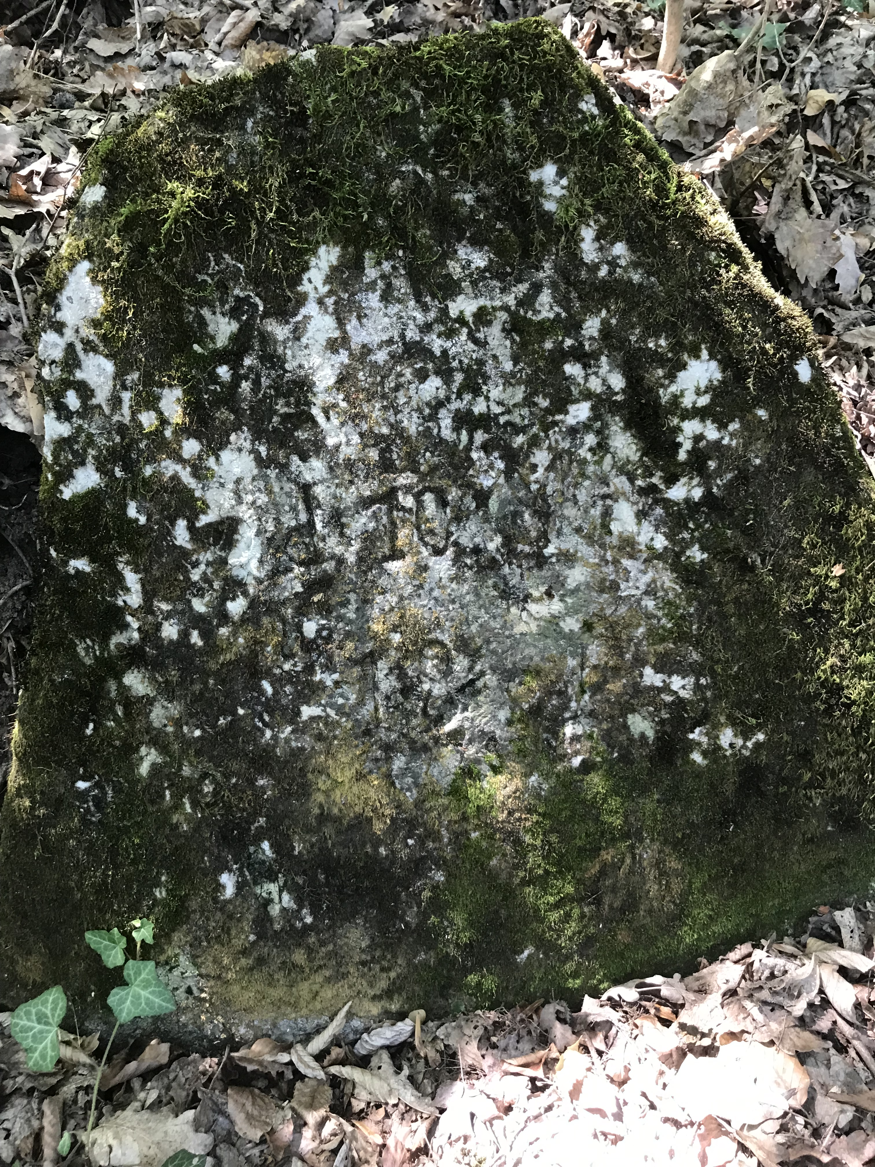 Erinnerungsstein für den Friede von Frankfurt in der Fränkenauer Hohle, Bad Kösen